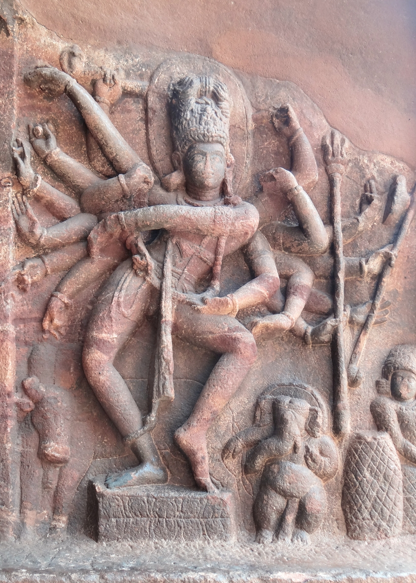 Shiva Nataraja sur la paroi droite à l'entrée de la grotte la plus ancienne (fin VIème siècle) du site de Badami Shiva Nataraja est la représentation du dieu effectuant la danse cosmique. Sur ce bas-relief, on dénombre 81 postures de la danse de Shiva. Badami fut la capitale de l'empire des Chalukya de 540 à 757, une période importante dans l'histoire de l'art indien. A l'époque Chalukya, les sculpteurs et artisans ont créé les temples troglodytiques, que l'on peut aujourd'hui visiter, et qui ont donné naissance aux temples dravidiens construits en pierre.